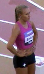 Matilda Bogdanoff Paavo Nurmen kisoissa, Paavo Nurmen stadionilla, Turussa, 16. kesäkuuta 2013